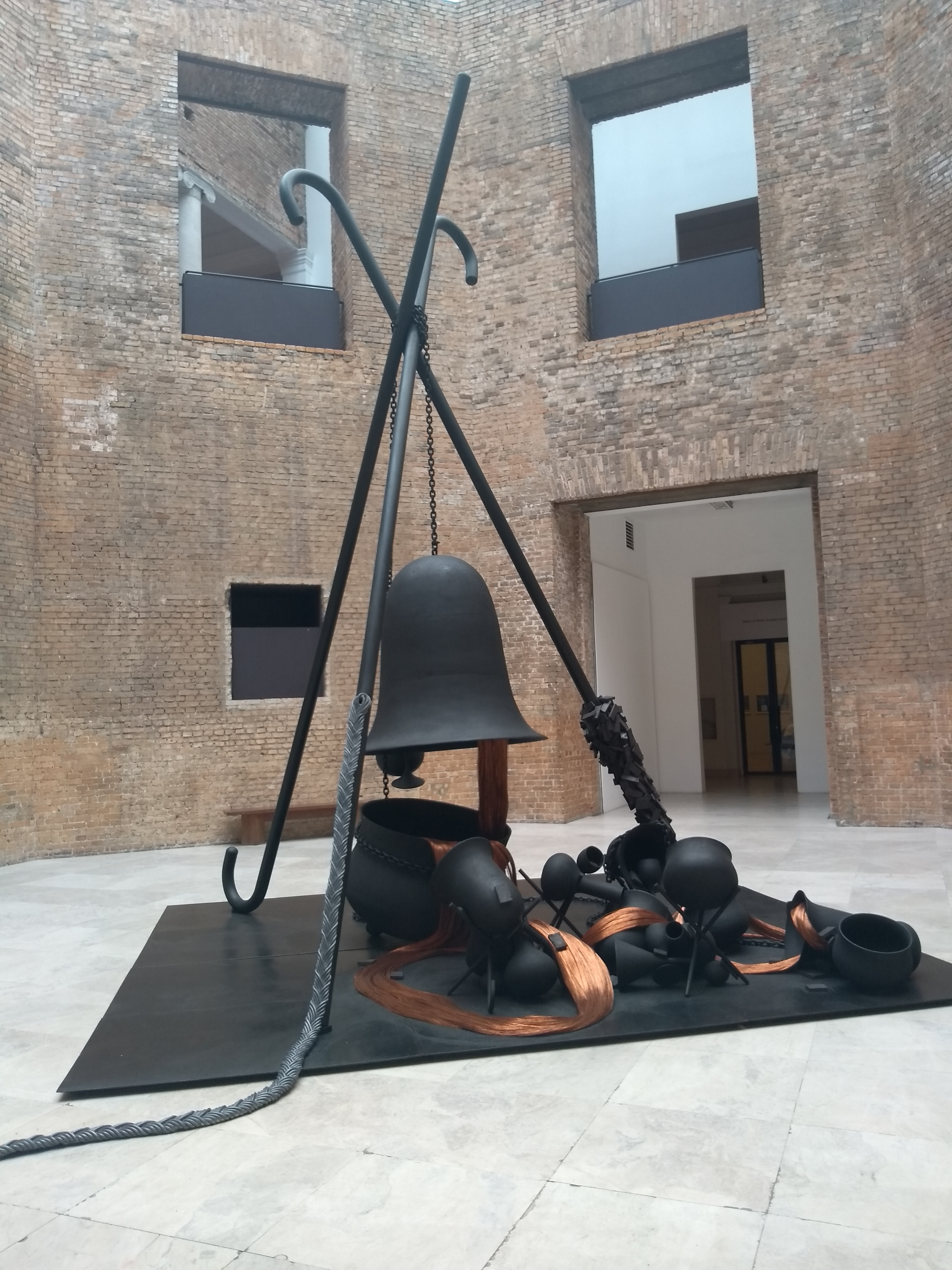 Obra Tríade Trindade do artista pernambucano Tunga exposta no octógono da Pinacoteca do Estado de São Paulo